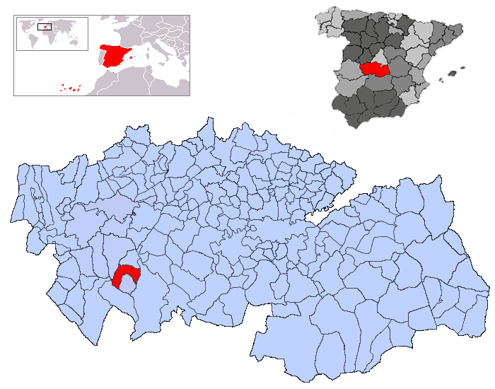 Torrecilla de la Jara en la provincia de Toledo